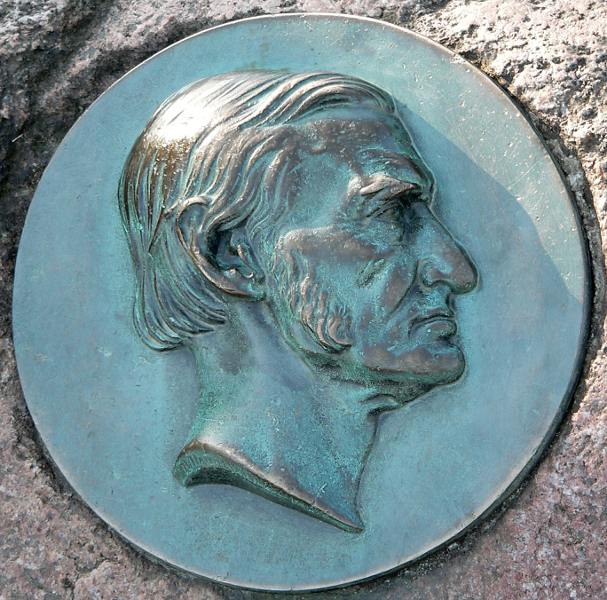 Gaußstein mit Gaußmedaillon auf dem Wilseder Berg